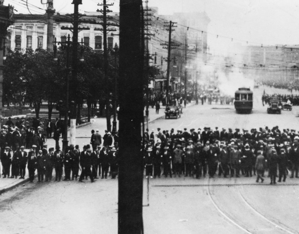 Winnipeg general strike turns into a riot.